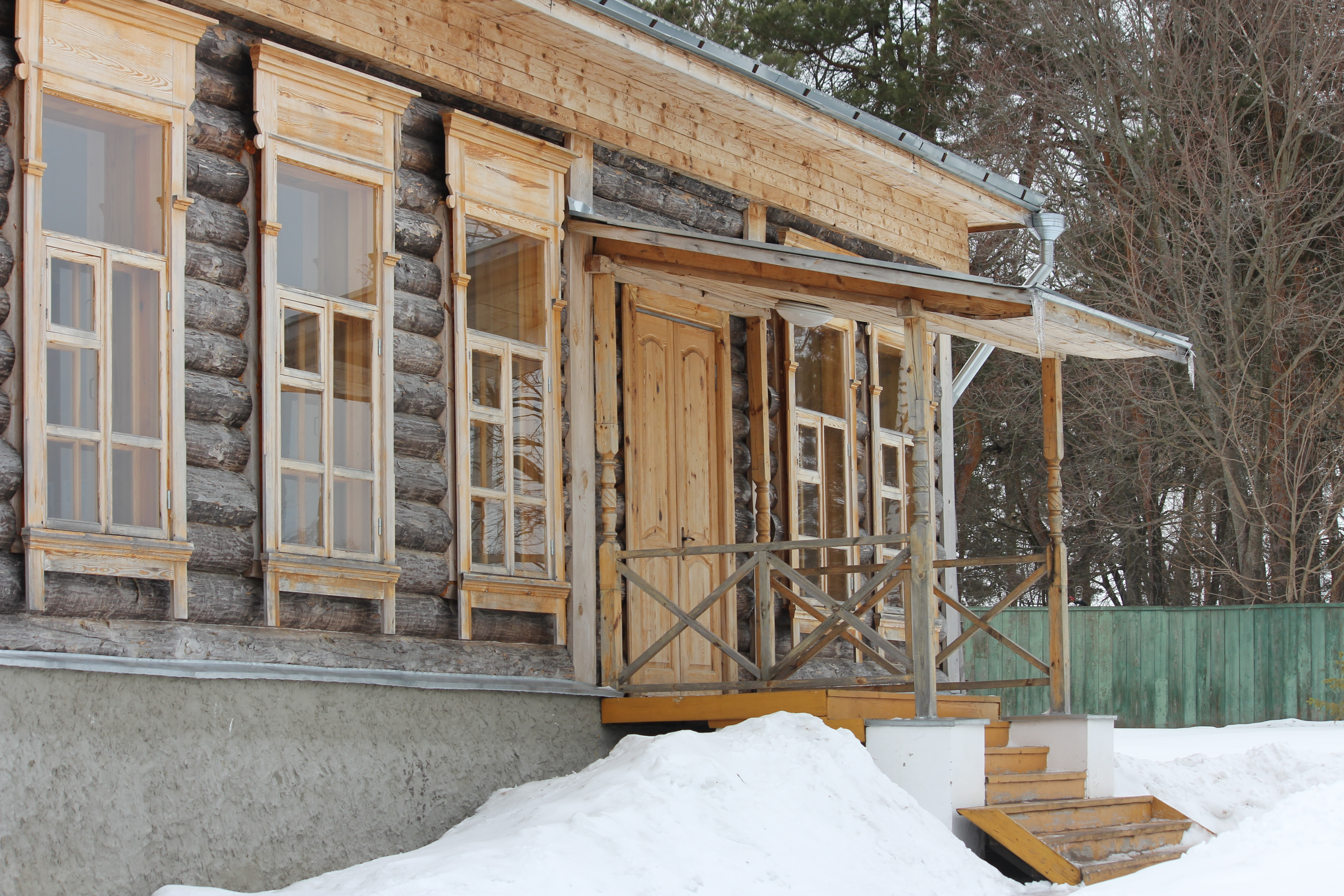 Школа грамоты, в которой проходил практику С.А. Есенин